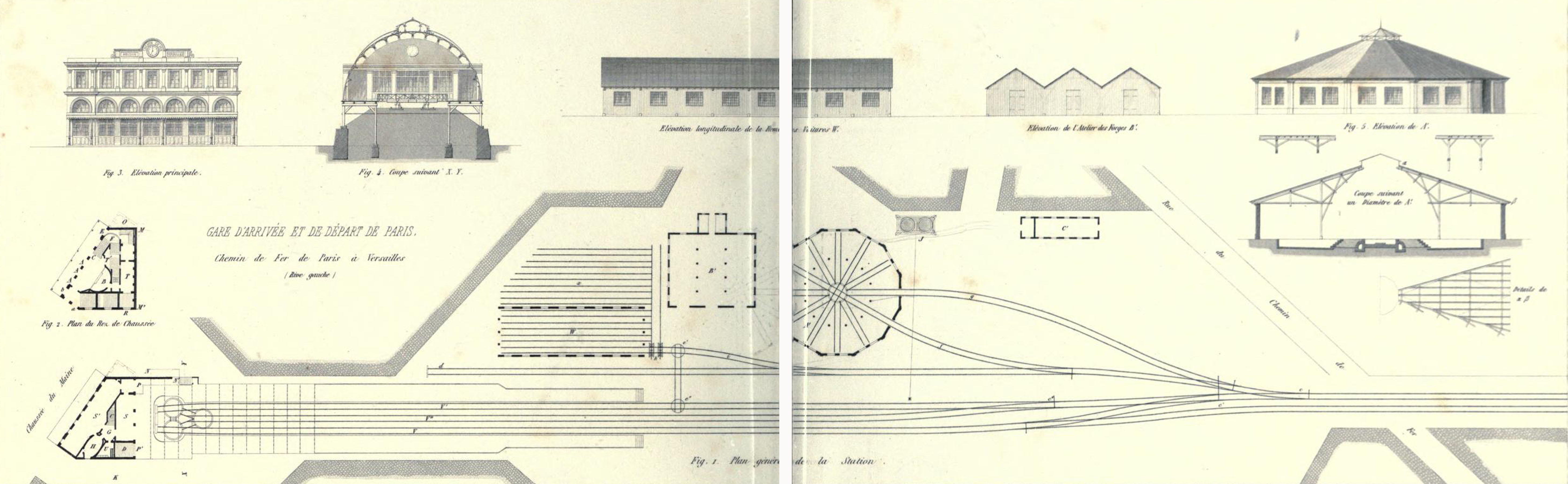 Embarcadère du Maine: gare d’arrivée et de départ de Paris, chemin de fer de Paris a Versailles (rive Gauche)